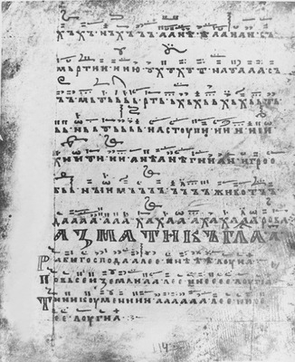 Асматик. Благовещенский Кондакарь. XII в. (РНБ. Q. n. I. 32. Л. 114 а)